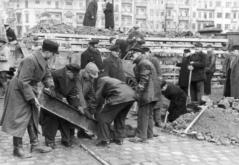 Berlin, Bau von Straßensperren ADN-ZB/Archiv Das faschistische Deutschland im II. Weltkrieg 1939-45 Berlin wird am 1. Februar 1945 zum "Verteidigungsbereich" erklärt. Zur Verstärkung einer Panzersperre am S-Bahnhof Hermannstraße in Neukölln graben Volkssturmsoldaten am 10. März 1945 Eisenträger ein. 297-45